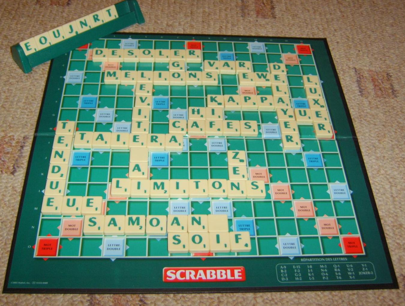 Prise par moi, chez moi